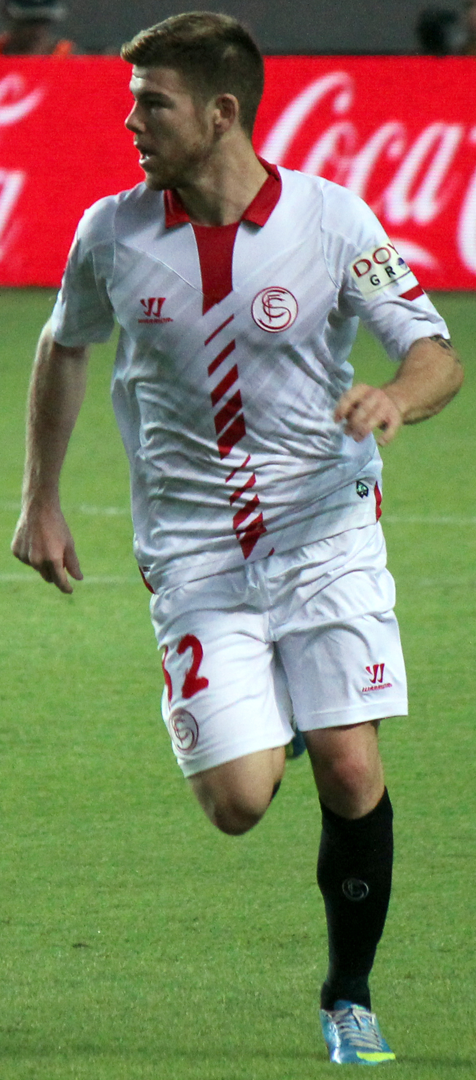 Futbolista del Sevilla FC